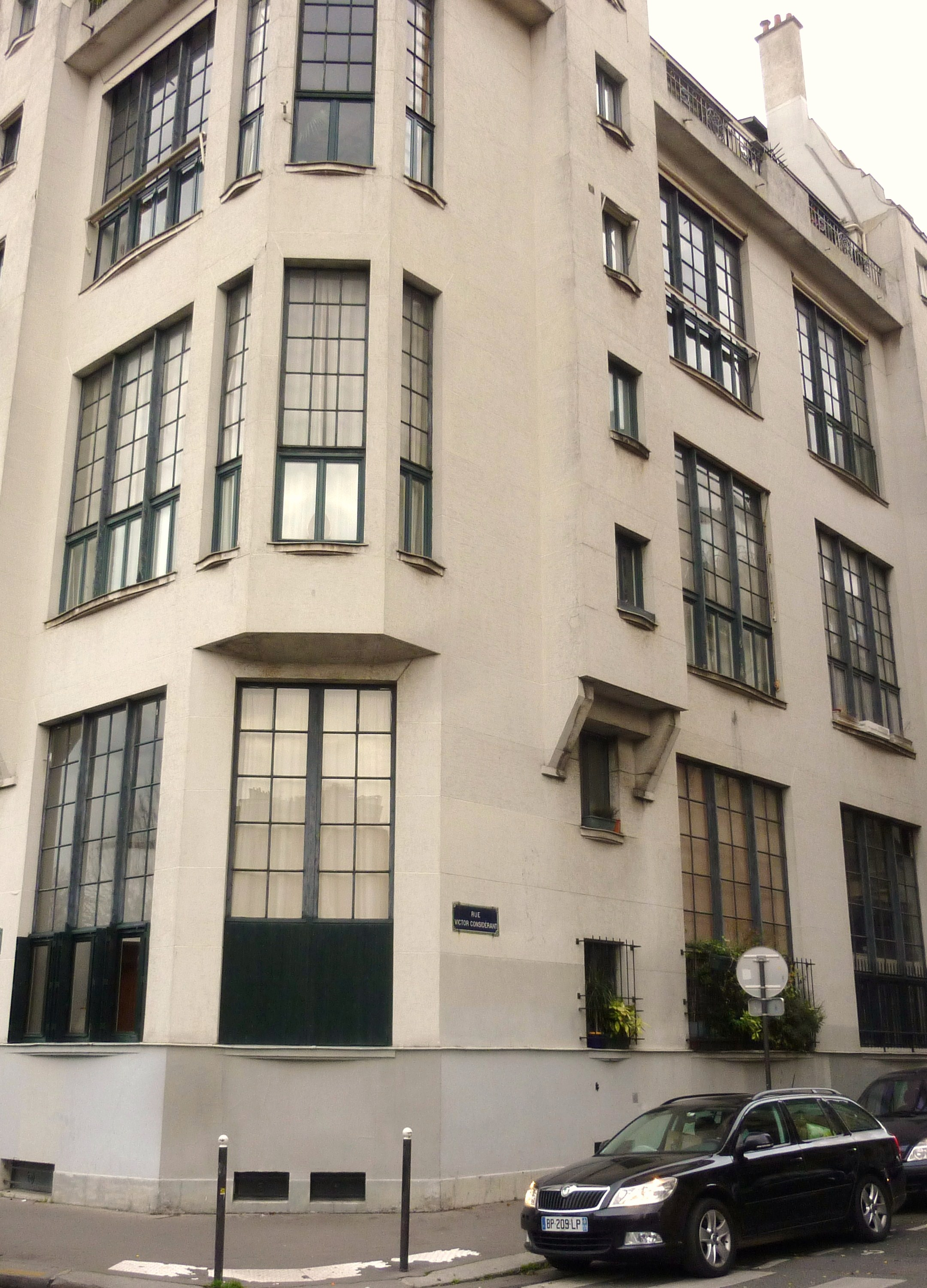 Maison où vécut Simone de Beauvoir de 1955 à 1986 11 bis rue Victor-Schœlcher Paris